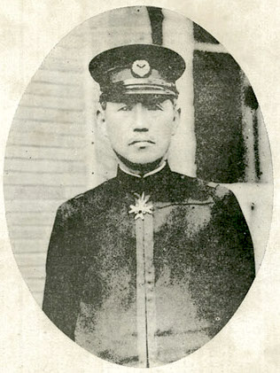 Bân-lâm-gú: 名尾良辰 日本の官僚